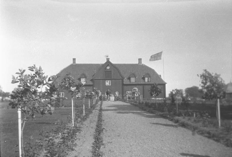 Oxenstiernska huset Motiv: Oxenstiernska huset, Värnanäs Kategori: HerrgårdOxenstiernska huset.